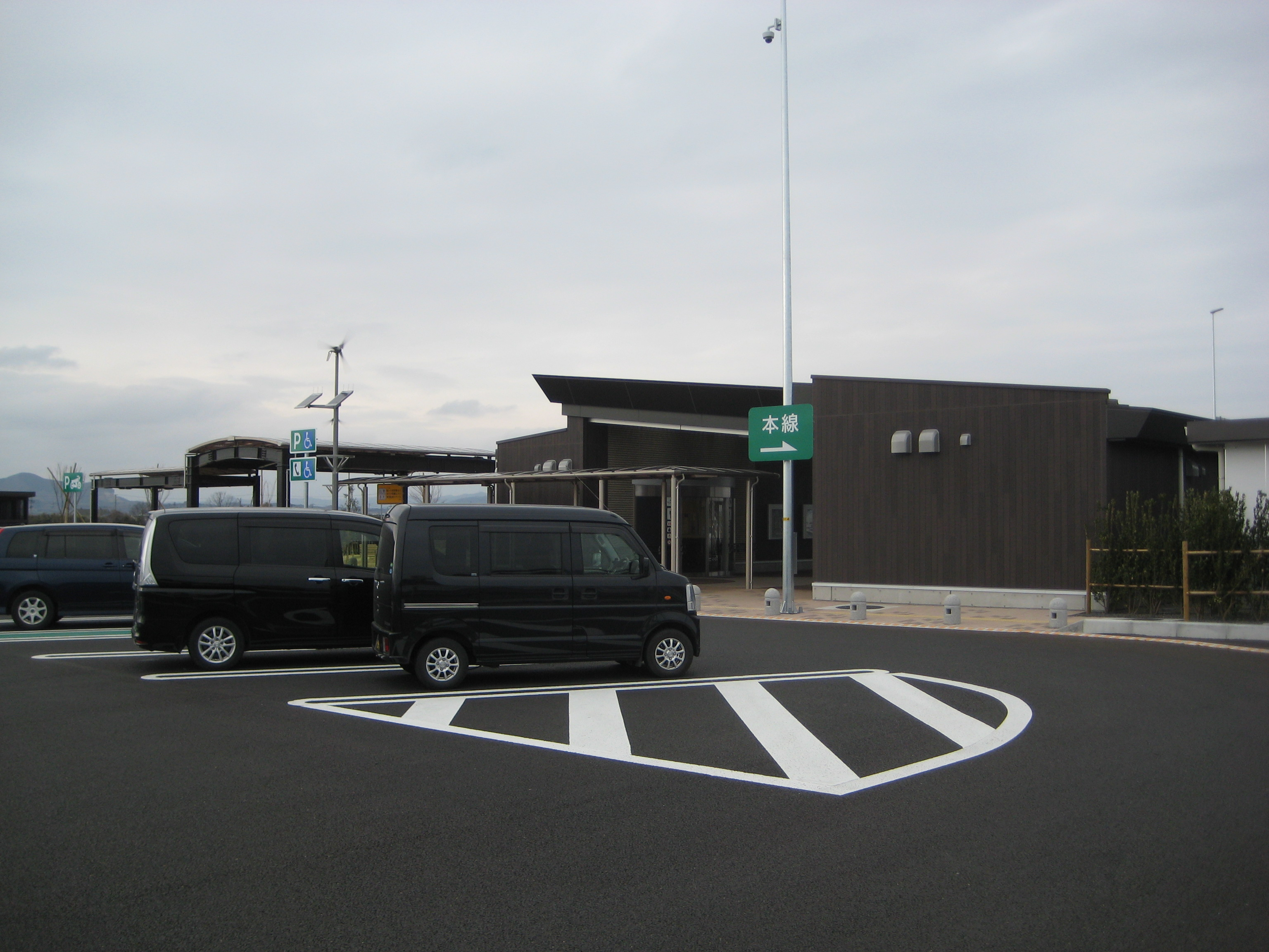 鳥の海パーキングエリア下り線施設(2015年3月7日撮影)